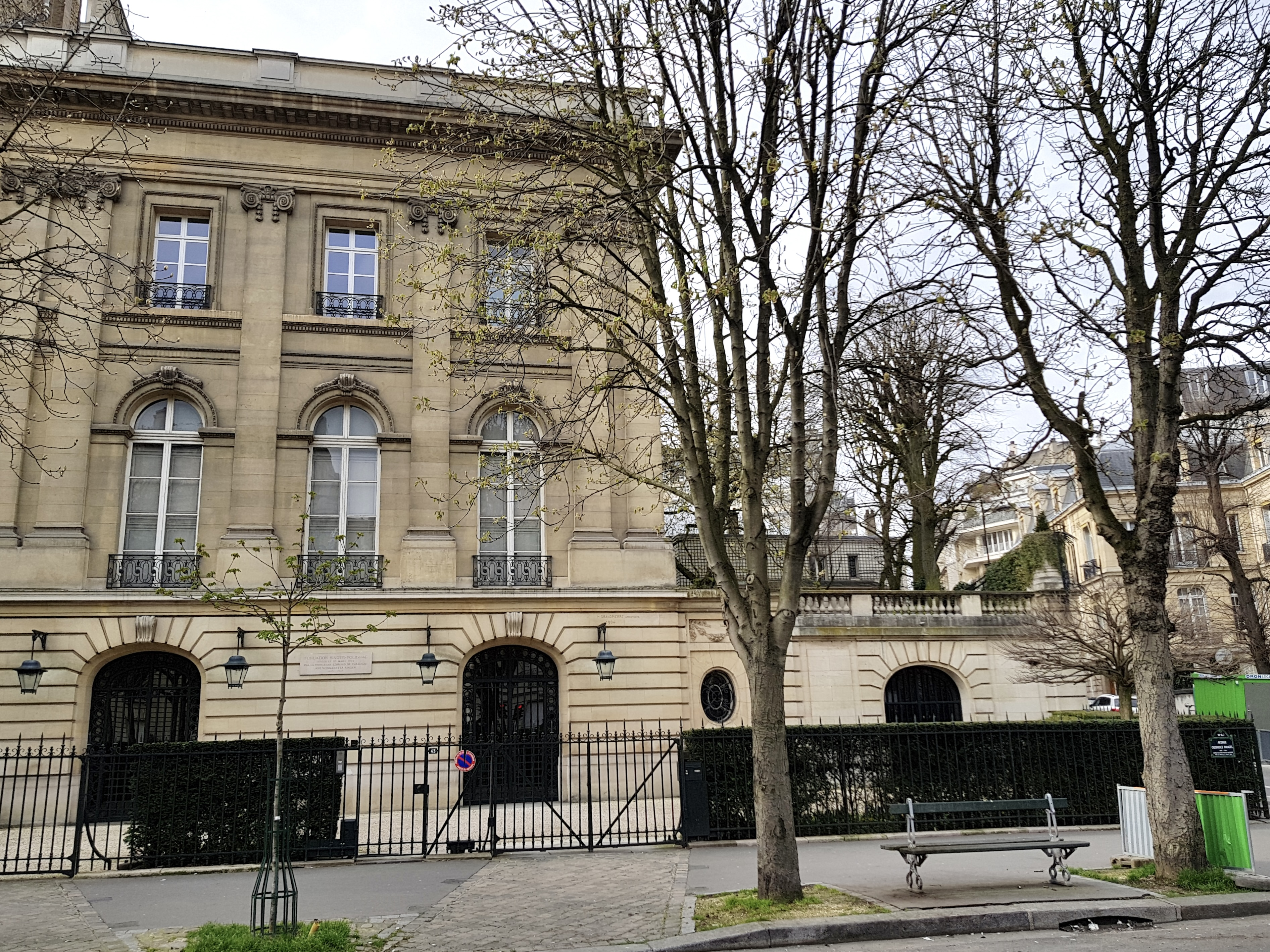 Fondation Singer-Polignac, 43 avenue Georges-Mandel, Paris 16e.